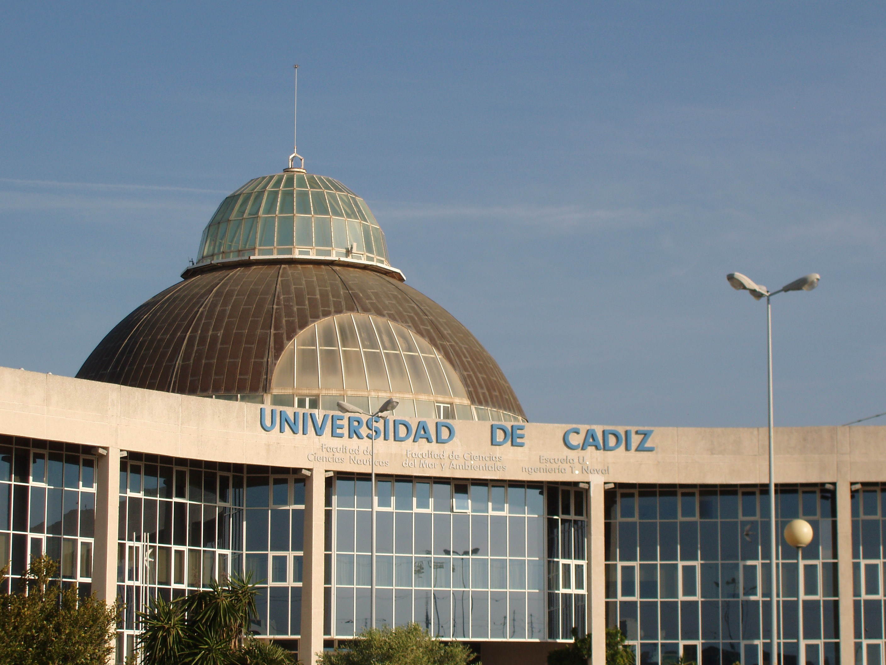 Cúpula CASEM Campus de Puerto Real